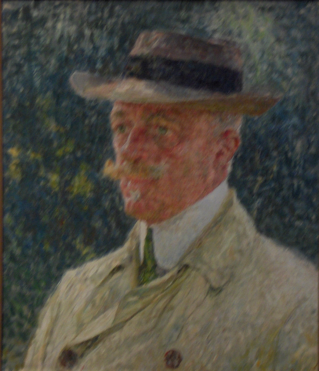 "Cyriel Buysse" (circa 1924) – olie op doek door Emile Claus; 55 x 46 cm; Museum van Deinze en de Leiestreek, België